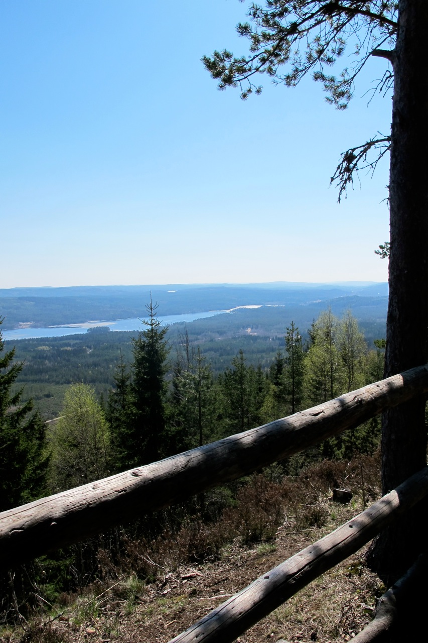 Utsikten fra toppen av Dronningens utsikt.